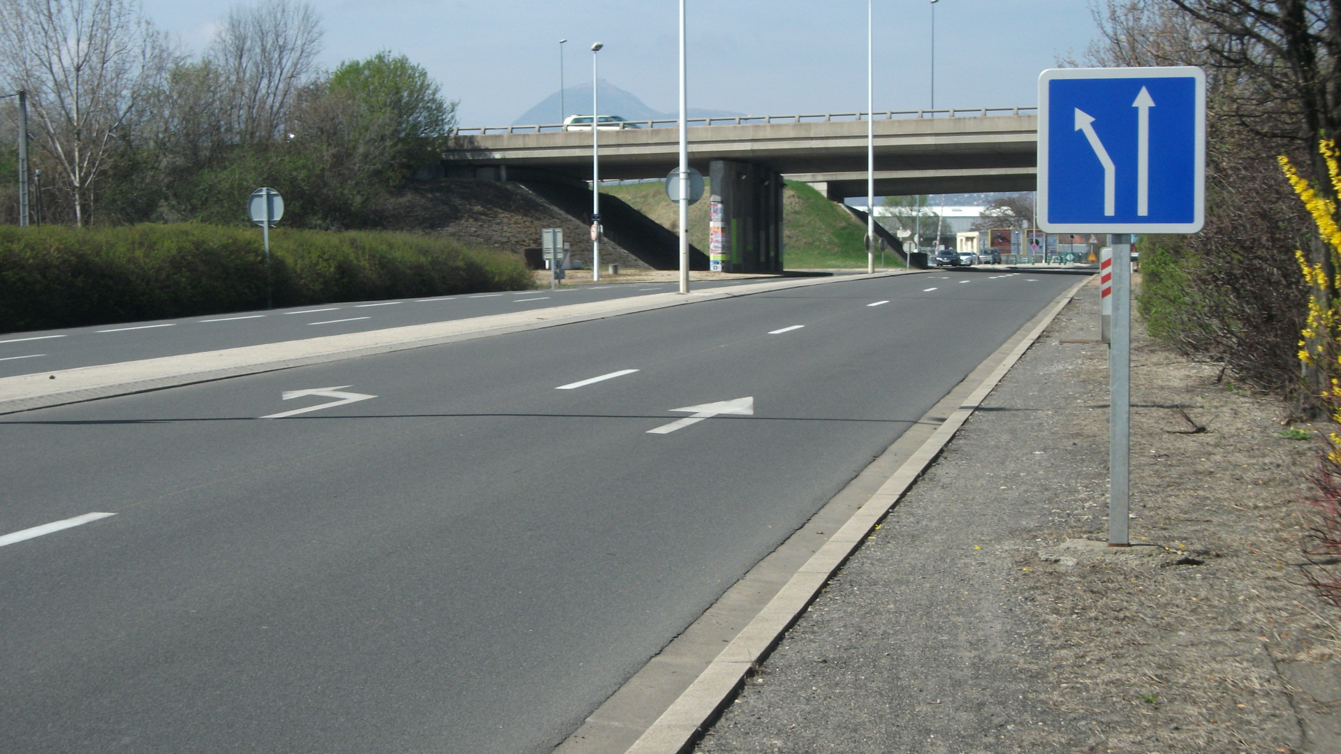 Signal C24b (voies affectées à l'approche d'une intersection, avec marquage des flèches de sélection sur la chaussée) - Affectation de voies sur D 769, Rue Youri Gagarine, Clermont-Ferrand, Puy-de-Dôme, Auvergne, France – Girod 2011